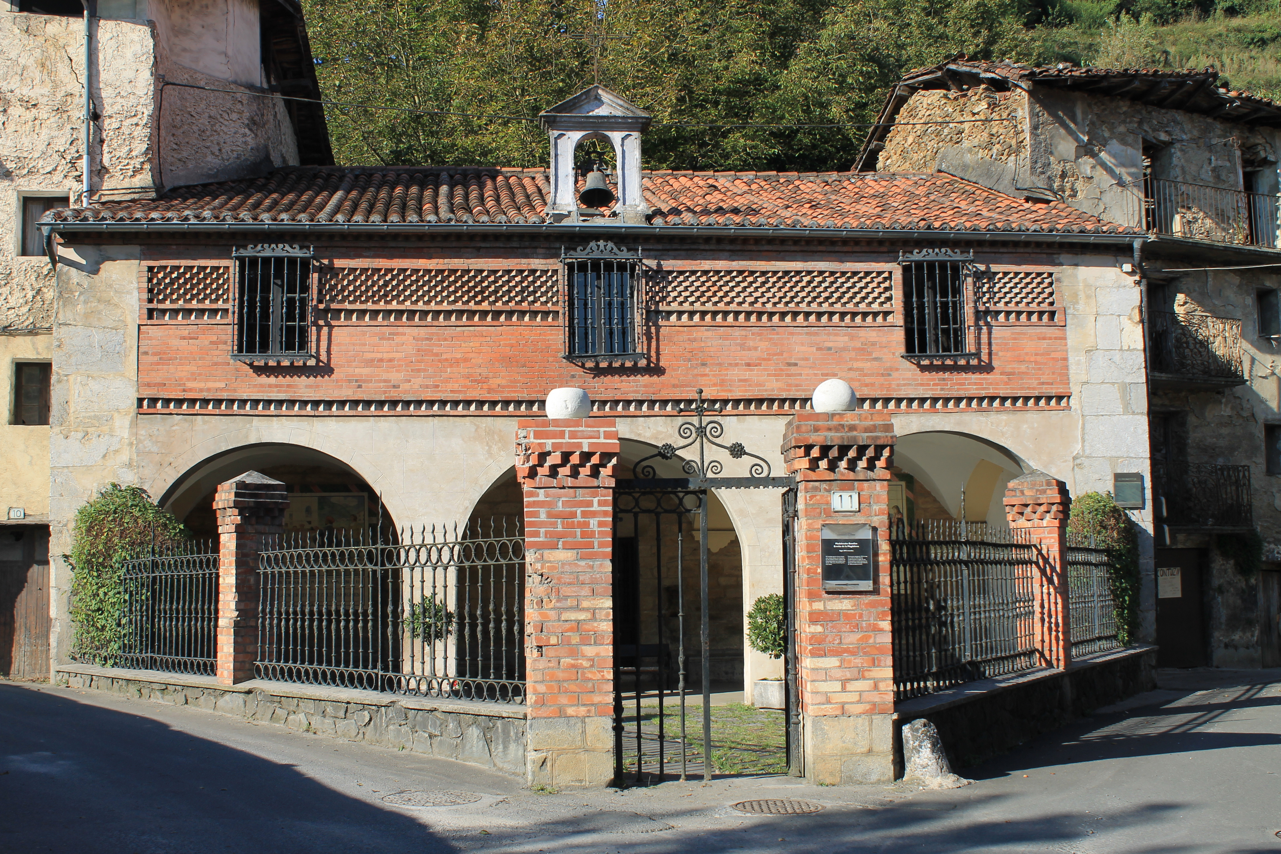 Casa de la Magdalena. En este hospital se hospedo San Ignacio durante tres meses en 1535.Aqui predicaba San ignacio a sus paisanos y enseñaba catecismo a los niños.